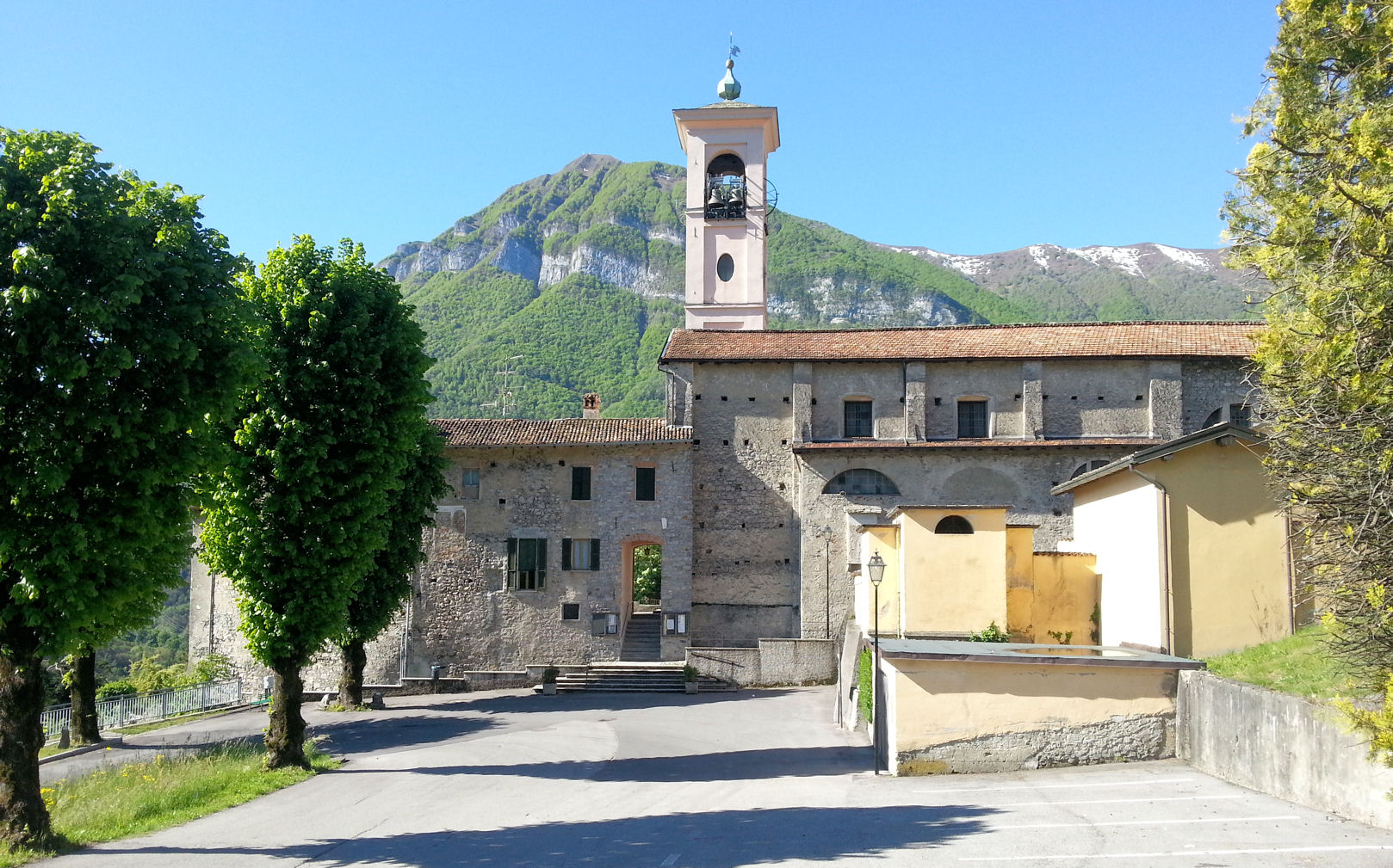 Chiesa di San Siro (Codogna)